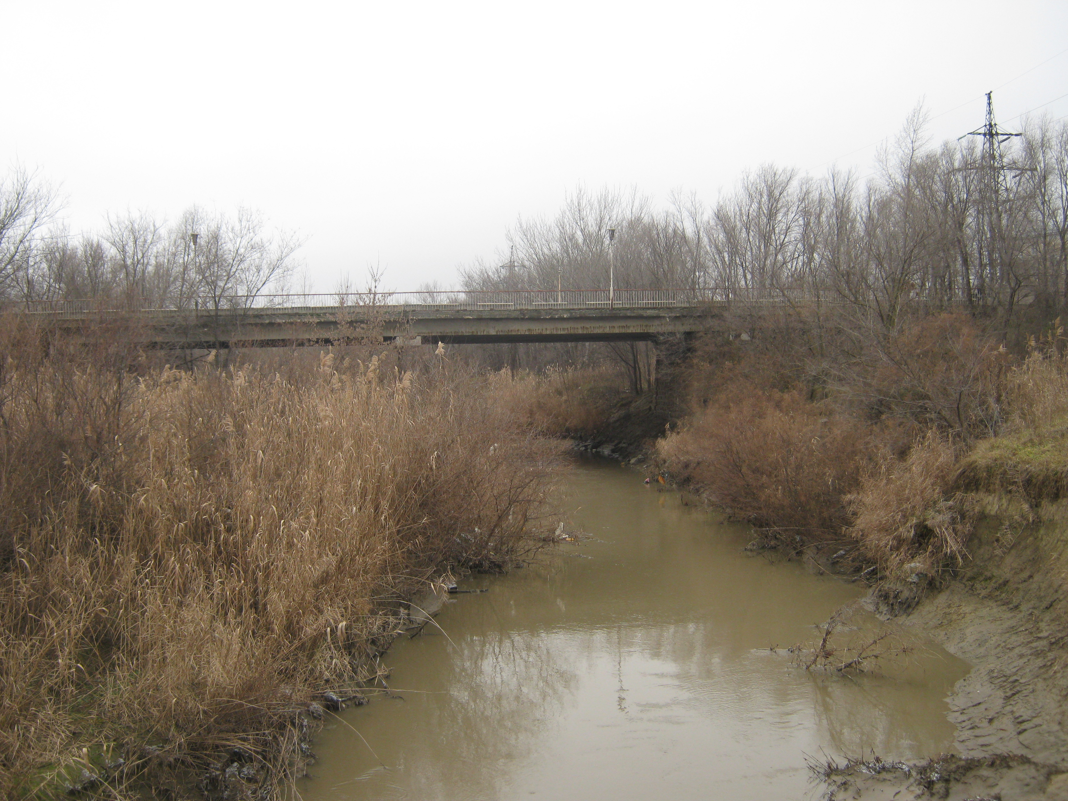 "Красный мост" - один из мостов в Светлораде через реку Калуас